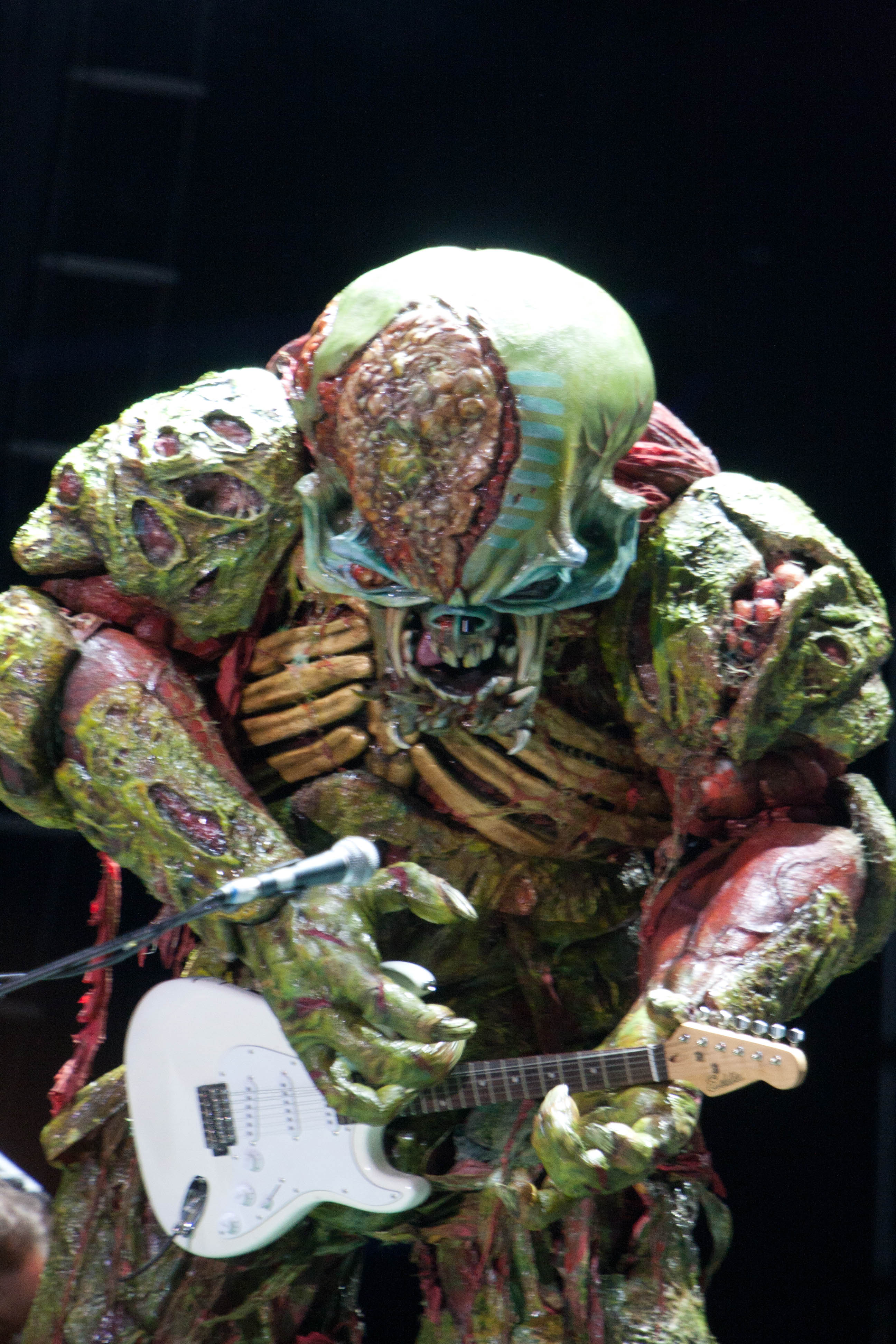 Eddie, mascota de Iron Maiden en el Bluesfest 2010, en Ottawa.